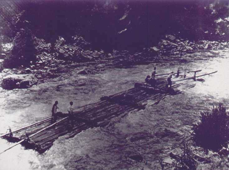 Imatge d'un rai de quatre trams